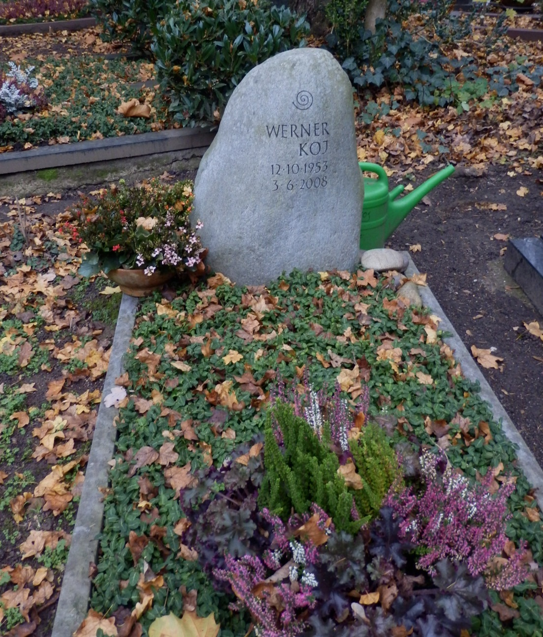 Werner Koj - Grab auf dem Kölner Südfriedhof